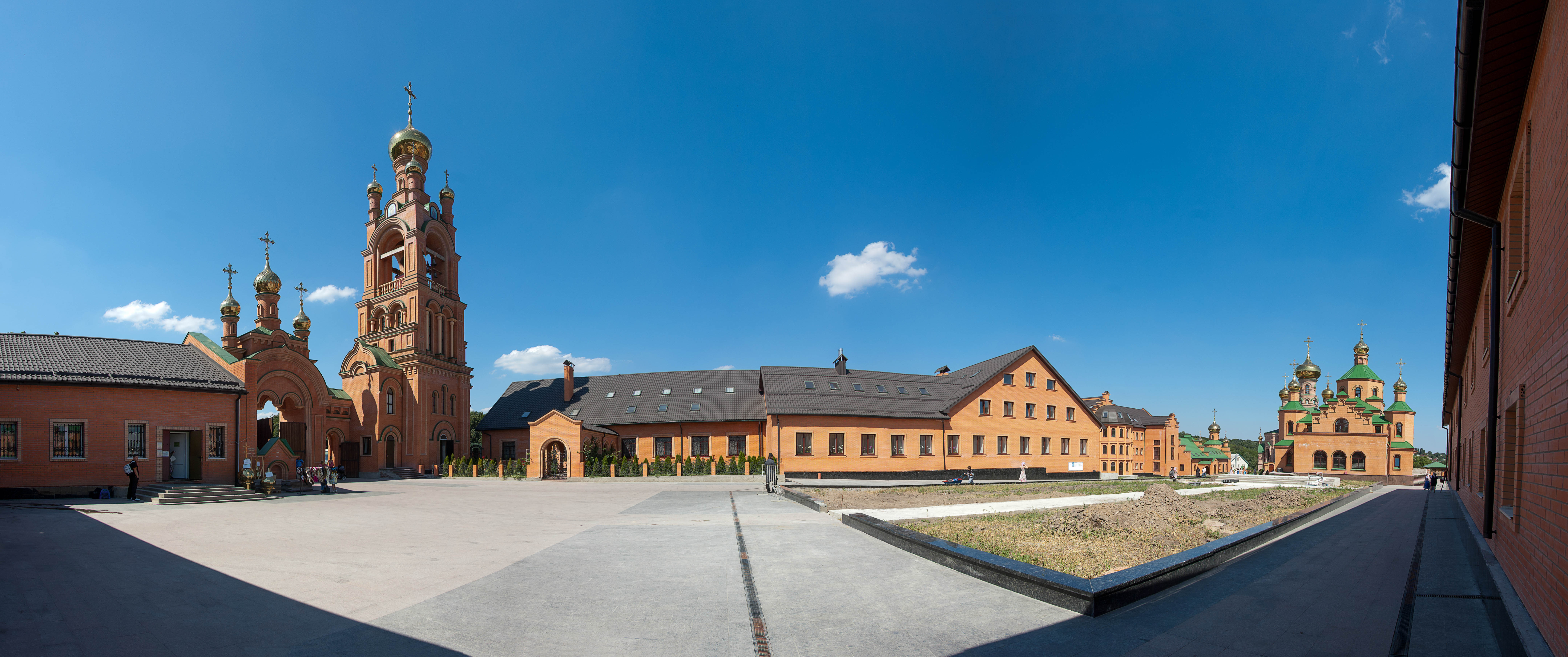 Голосіївська Свято-Покровська пустинь, Київ, Затєвахіна Полковника вул., 14